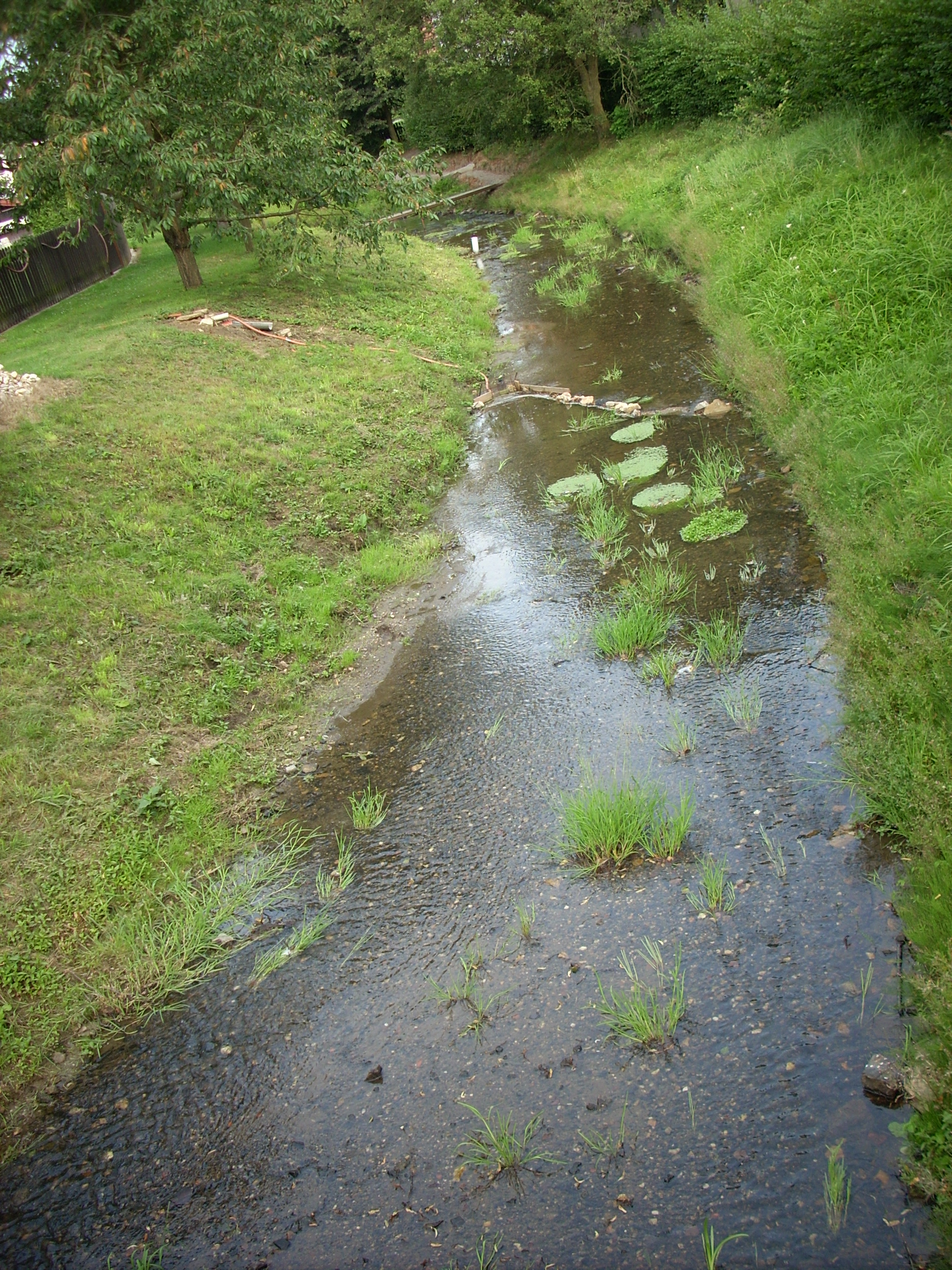 Věžnička, říčka Šlapanka